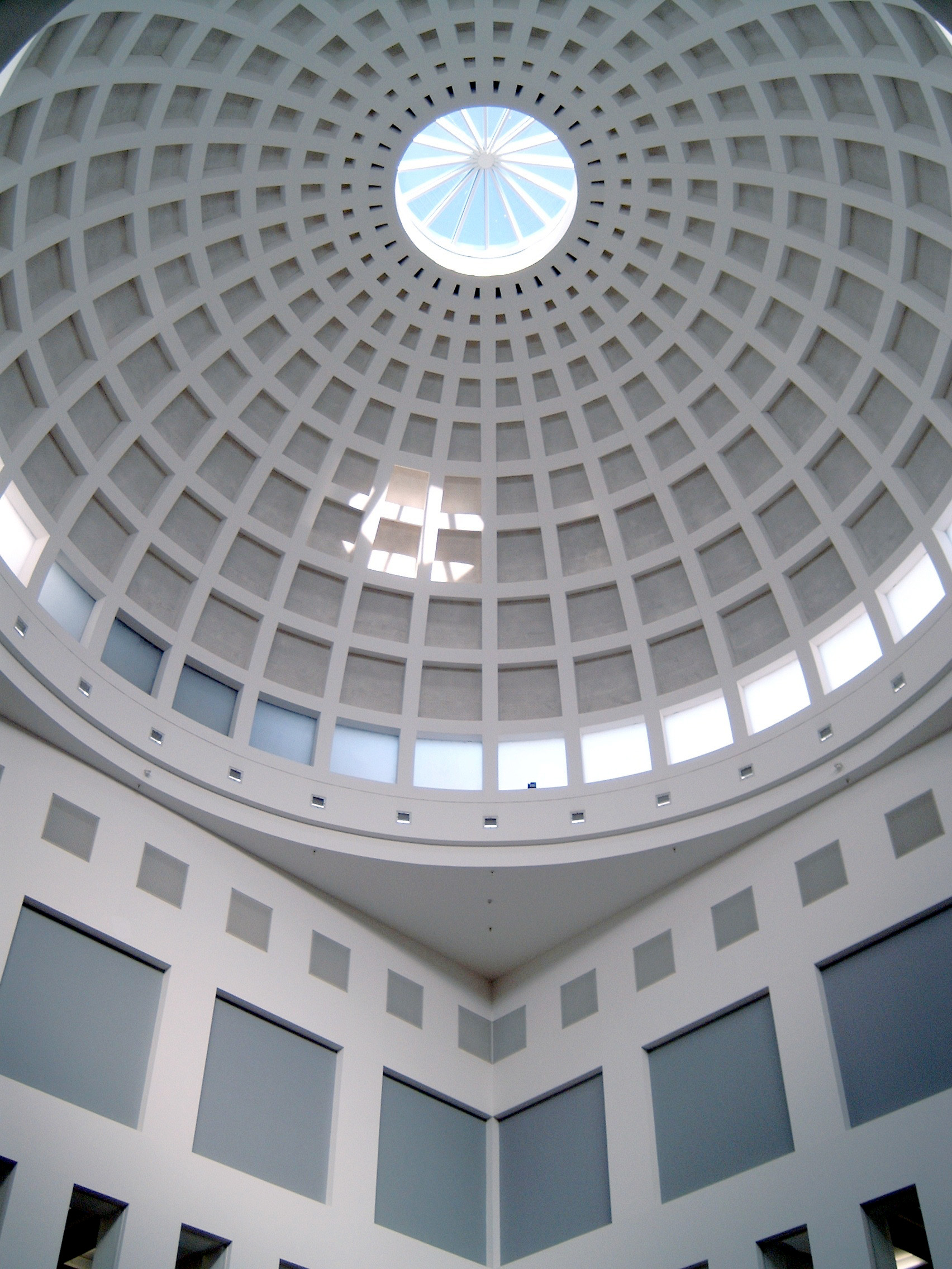 Lesesaal der Badischen Landesbibliothek in Karlsruhe, Architekt: Oswald Mathias Ungers